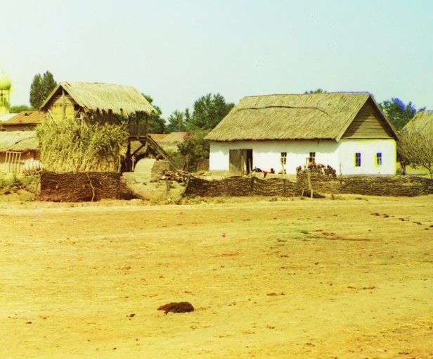 Sabirabad (Petropavlovka).